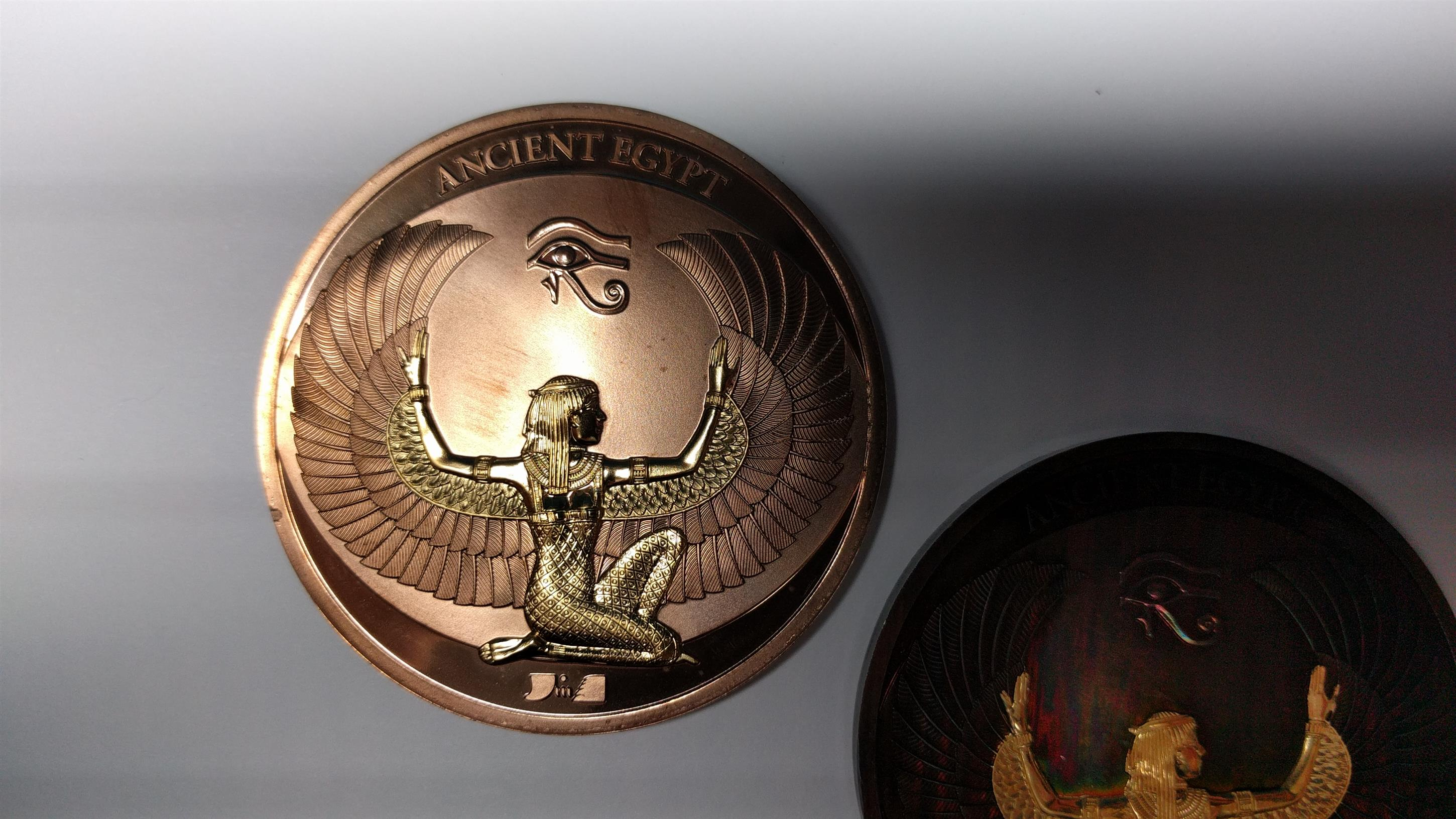 Die Namensnennung umfasst minimal die Angabe "Markus Eckardt 2017, mokume-saar.de". Ansonsten gilt die Creative-Commons-Lizenz „Namensnennung 4.0 international“. Siehe hierzu die Angabe auf